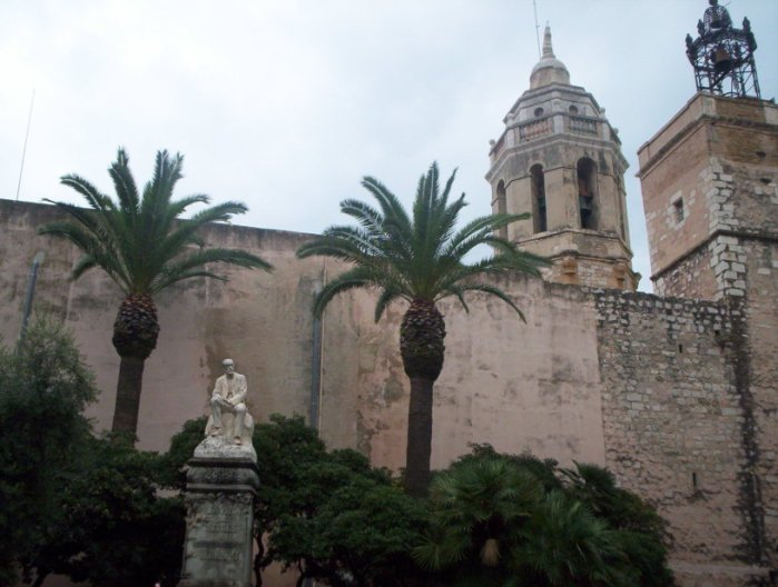 El punt de vista pot ser molt important.Sitges